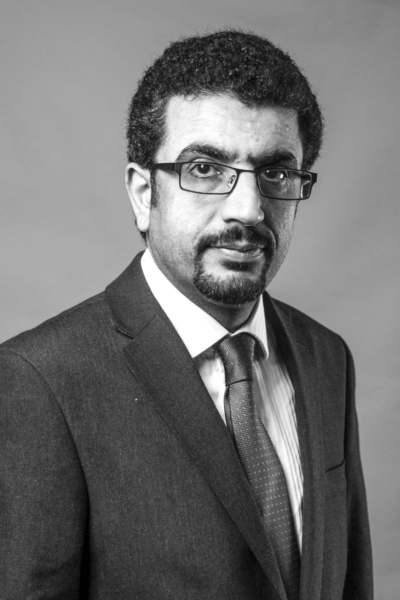 Авар: الكاتب الصحفي عباس بوصفوان